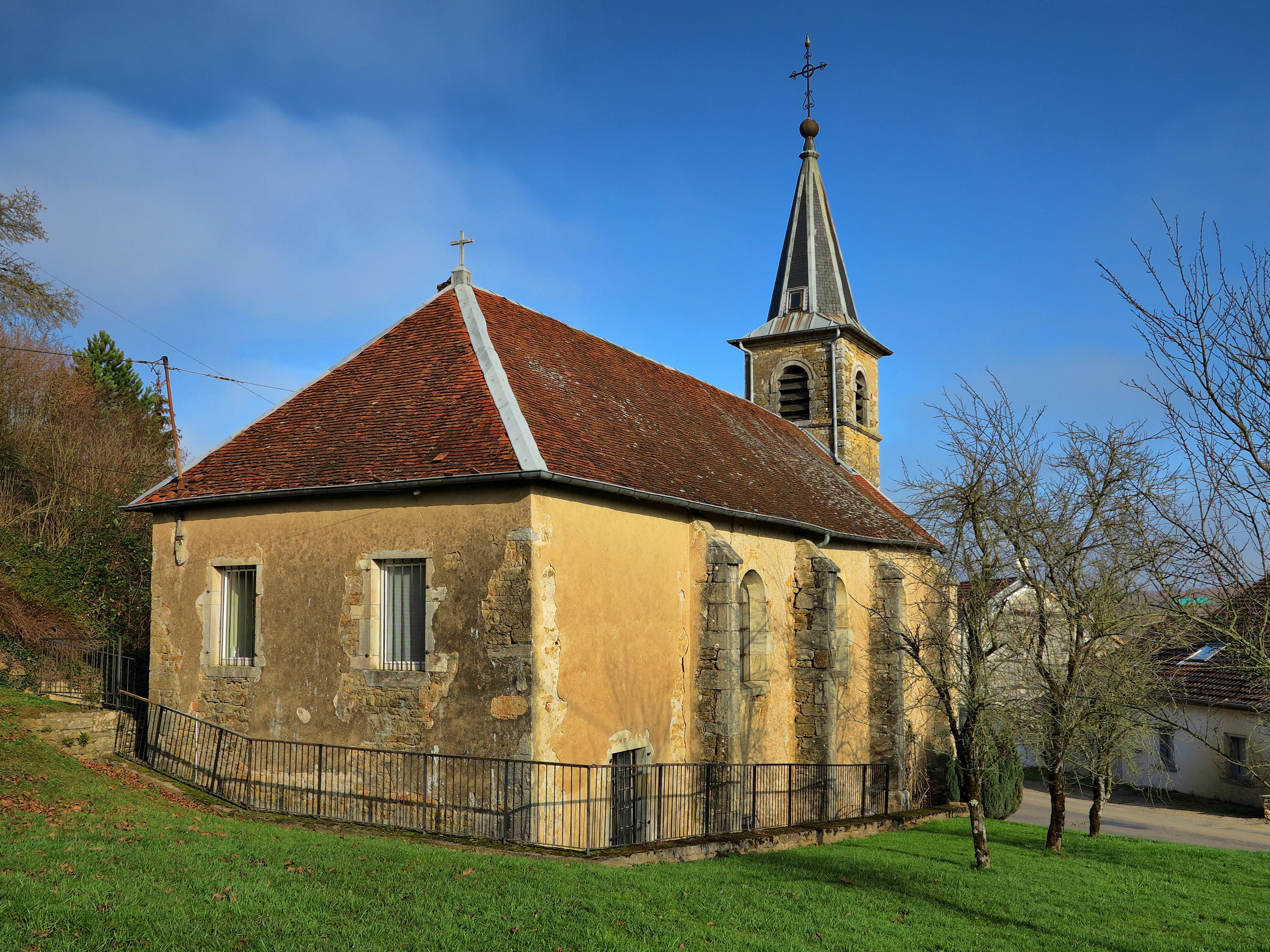 L'église-mairie de Franey